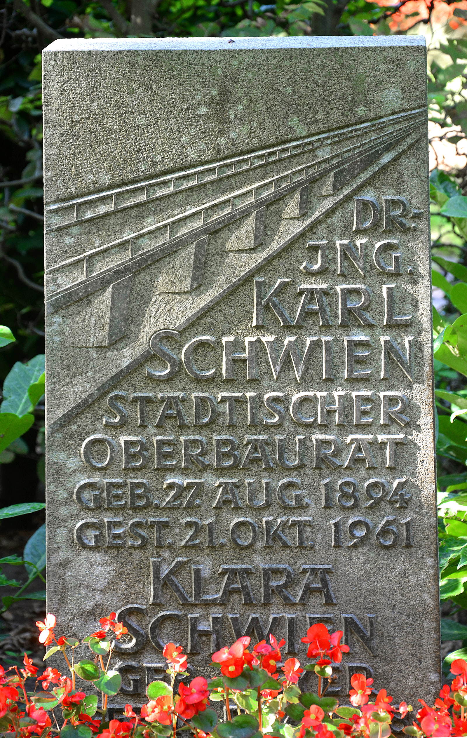 Grabmal der Familie des hannoverschen Oberbaurats Dr.-Ing. Karl Schwien (geboren 27. August 1894; gestorben 21. Oktober 1961) und der Klara, ...